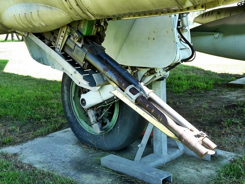 Kanonenbehälter SPPU-22-01 mit abgesenkter Zwillingskanone GSch-23 unter dem Flügel einer Suchoj Su-22M-4 der Luftstreitkräfte der Nationalen Volksarmee.